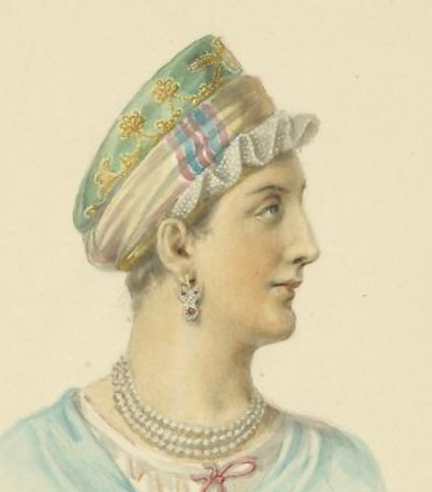 Тихвинская женщина в повойнике. Ф. Г. Солнцев «Одежды Русского государства»